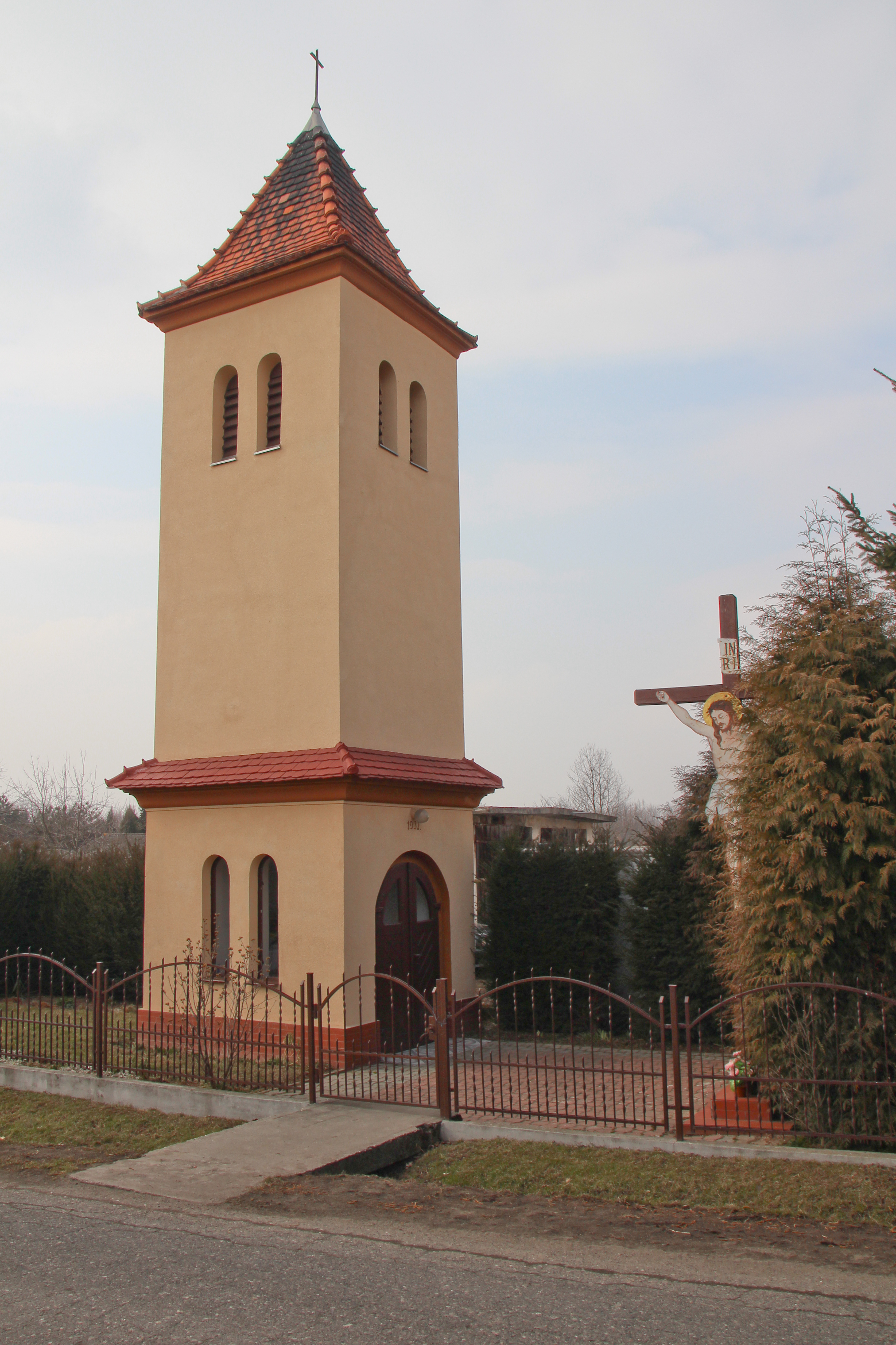 Polana – wieś w Polsce, w województwie opolskim, w powiecie brzeskim, w gminie Grodków.